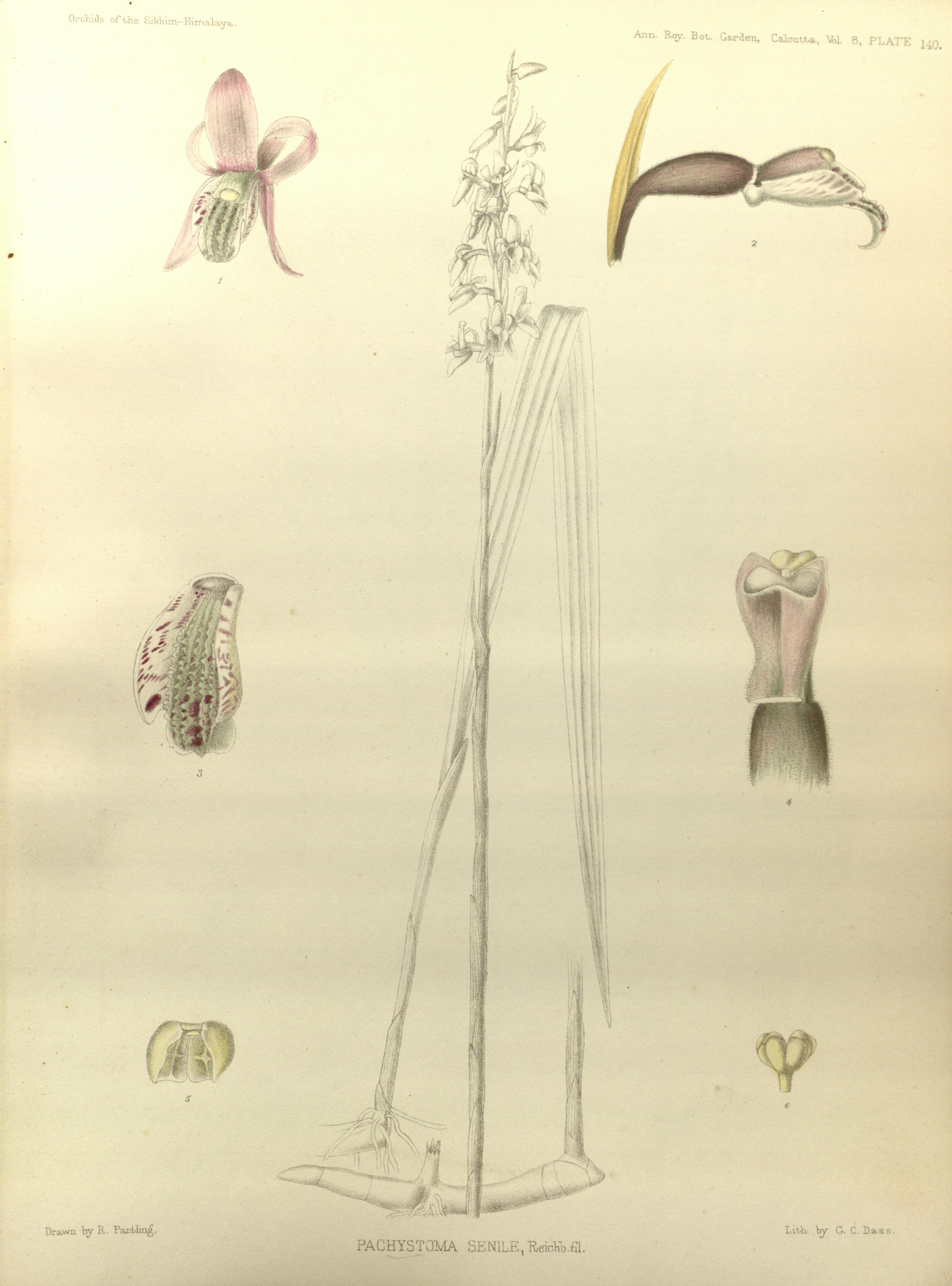 Pachystoma pubescens